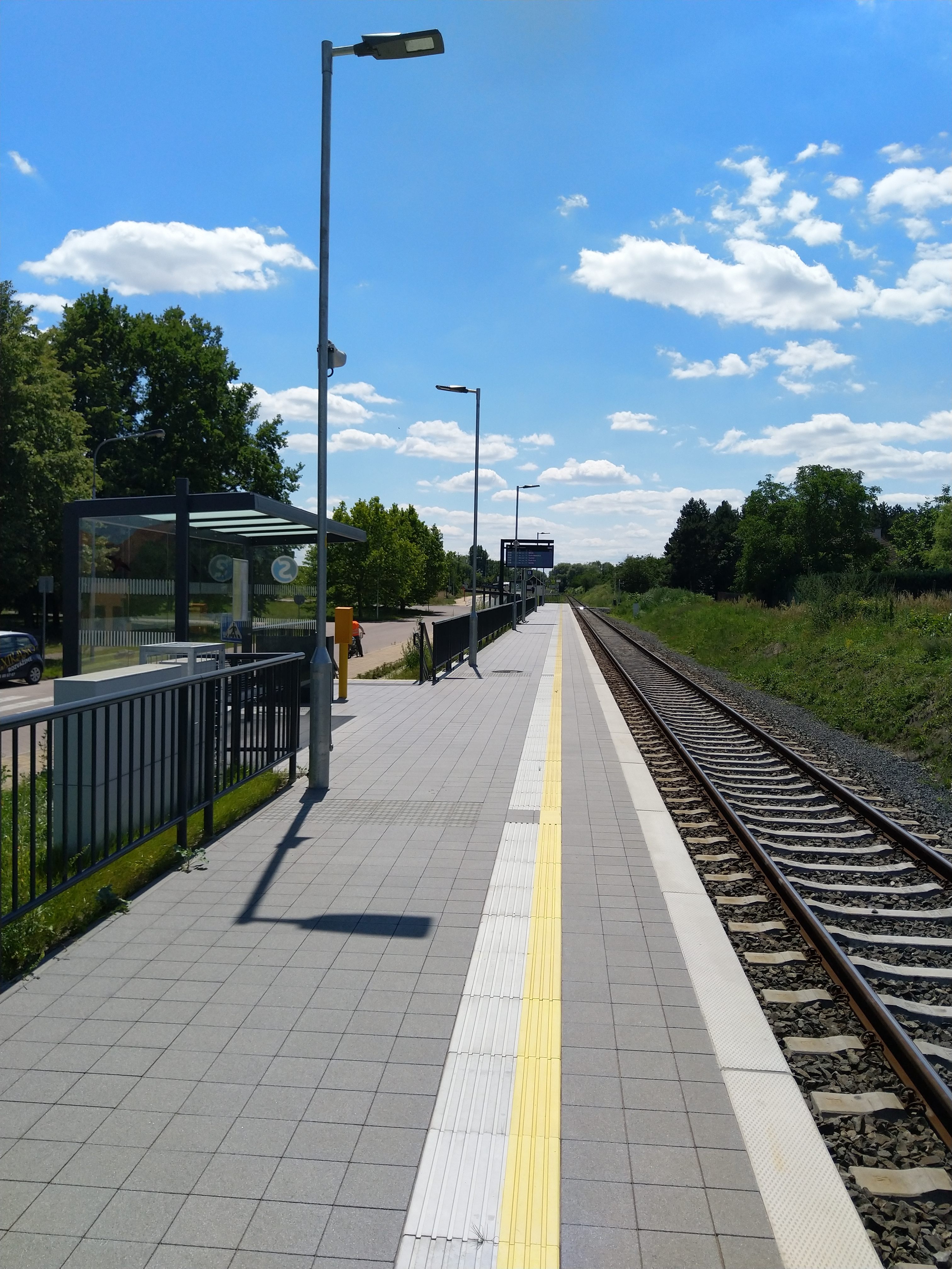 Zastávka Neratovice sídliště po dokončení